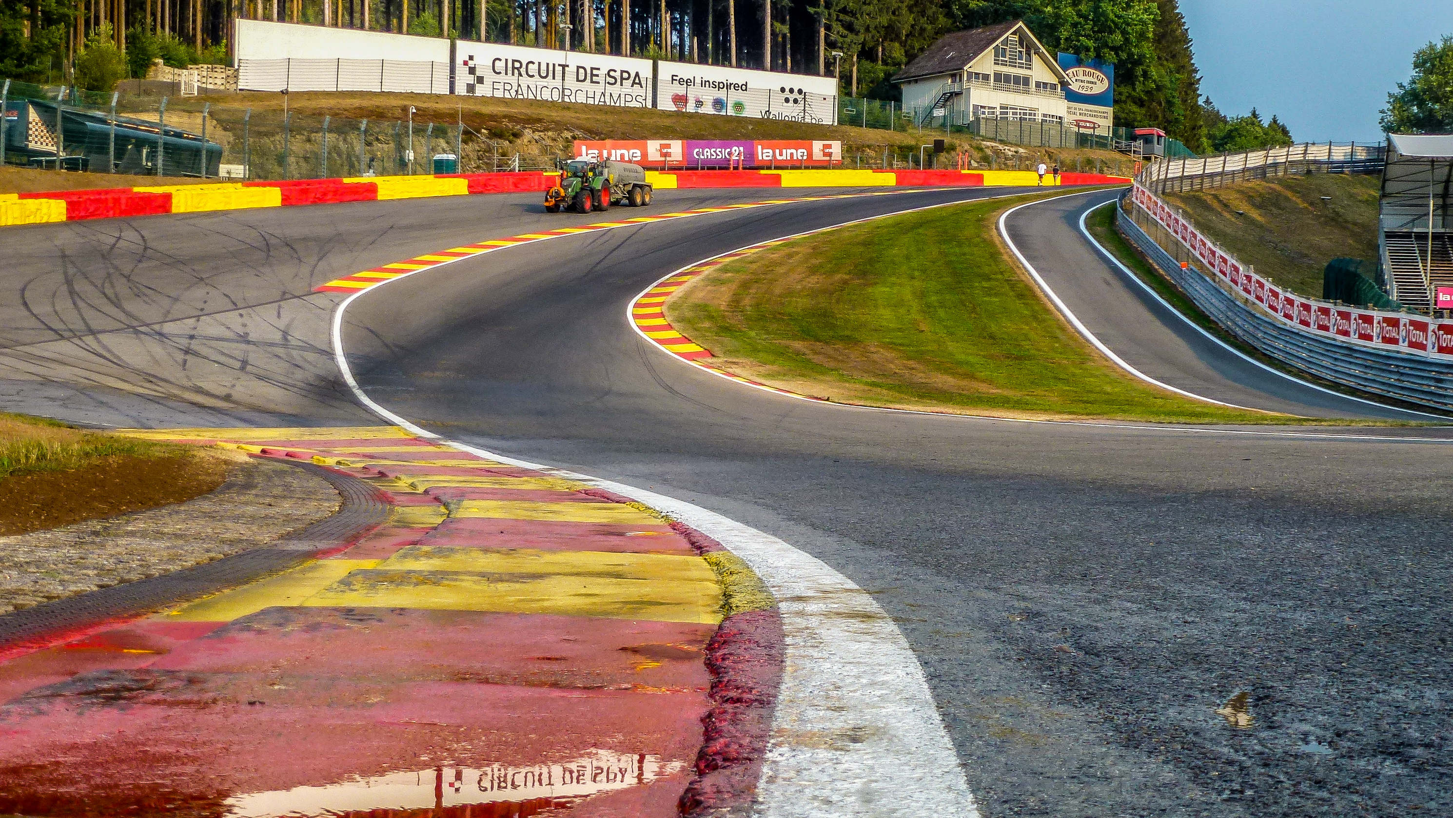 Die neu gestaltete Kurve Eau Rouge/Raidillon mit großer, asphaltierter Auslaufzone.